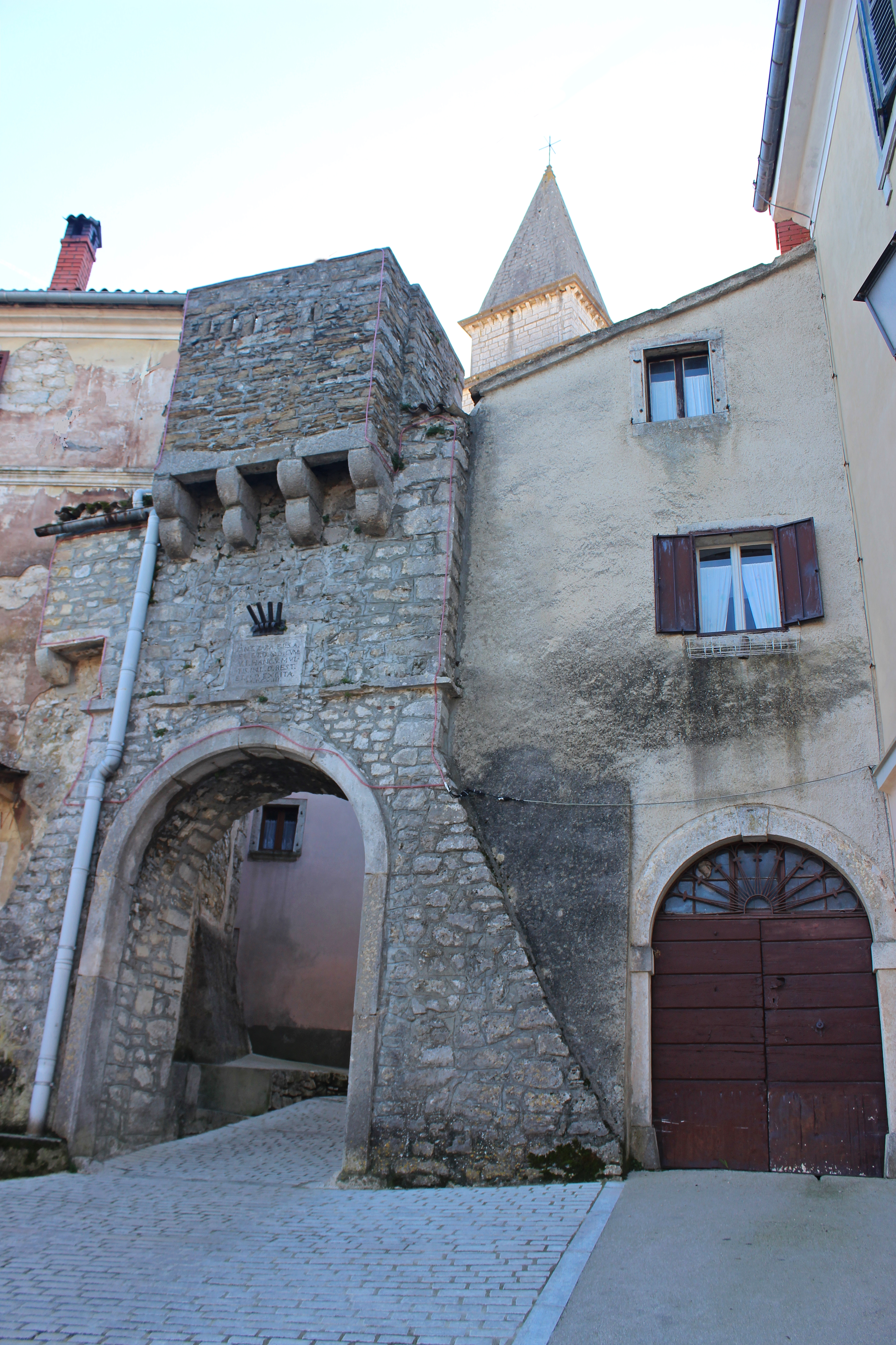 Central part of Pićan